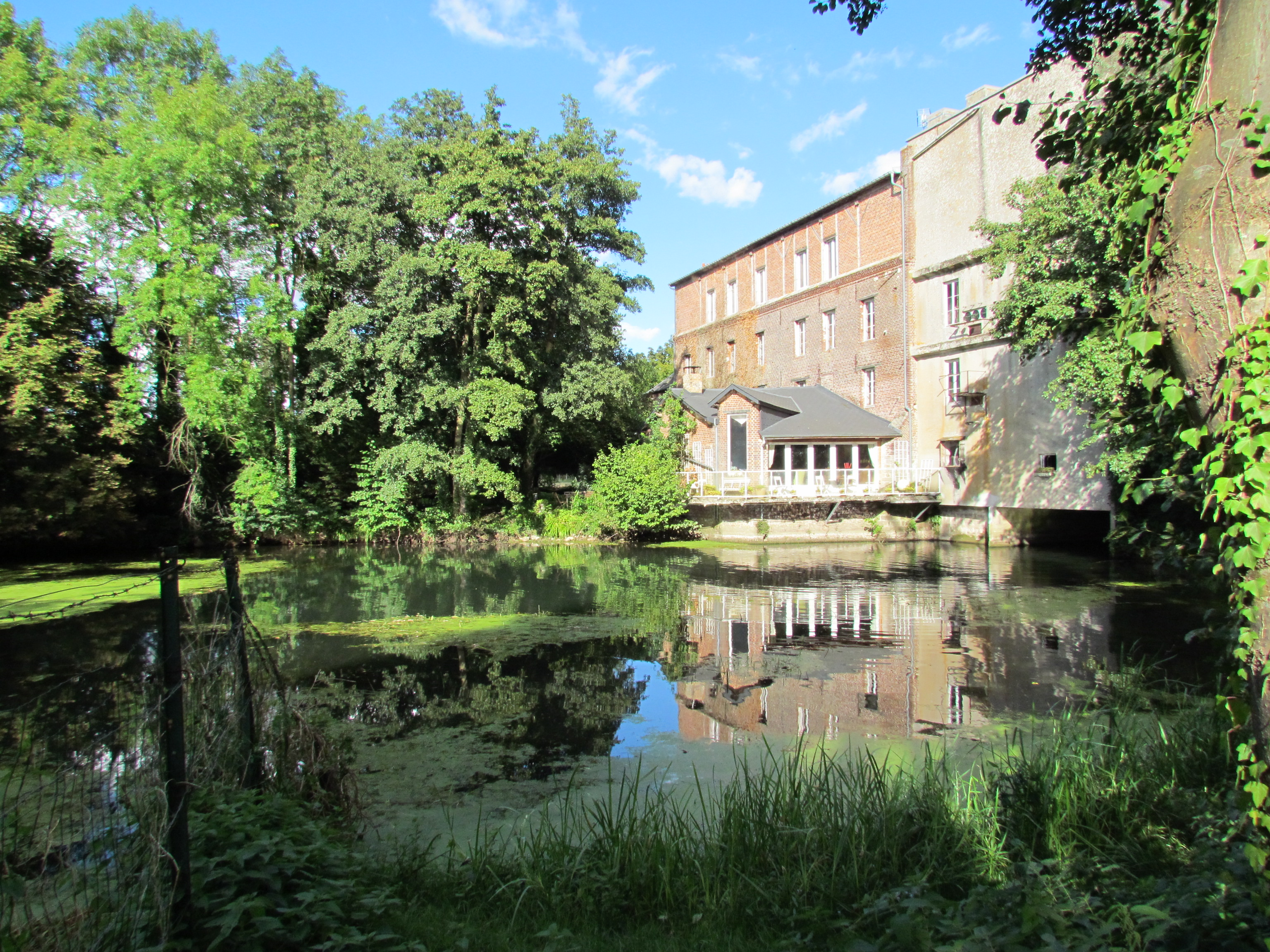 Des photos de mon Village en Hiver sous la neige et en Eté